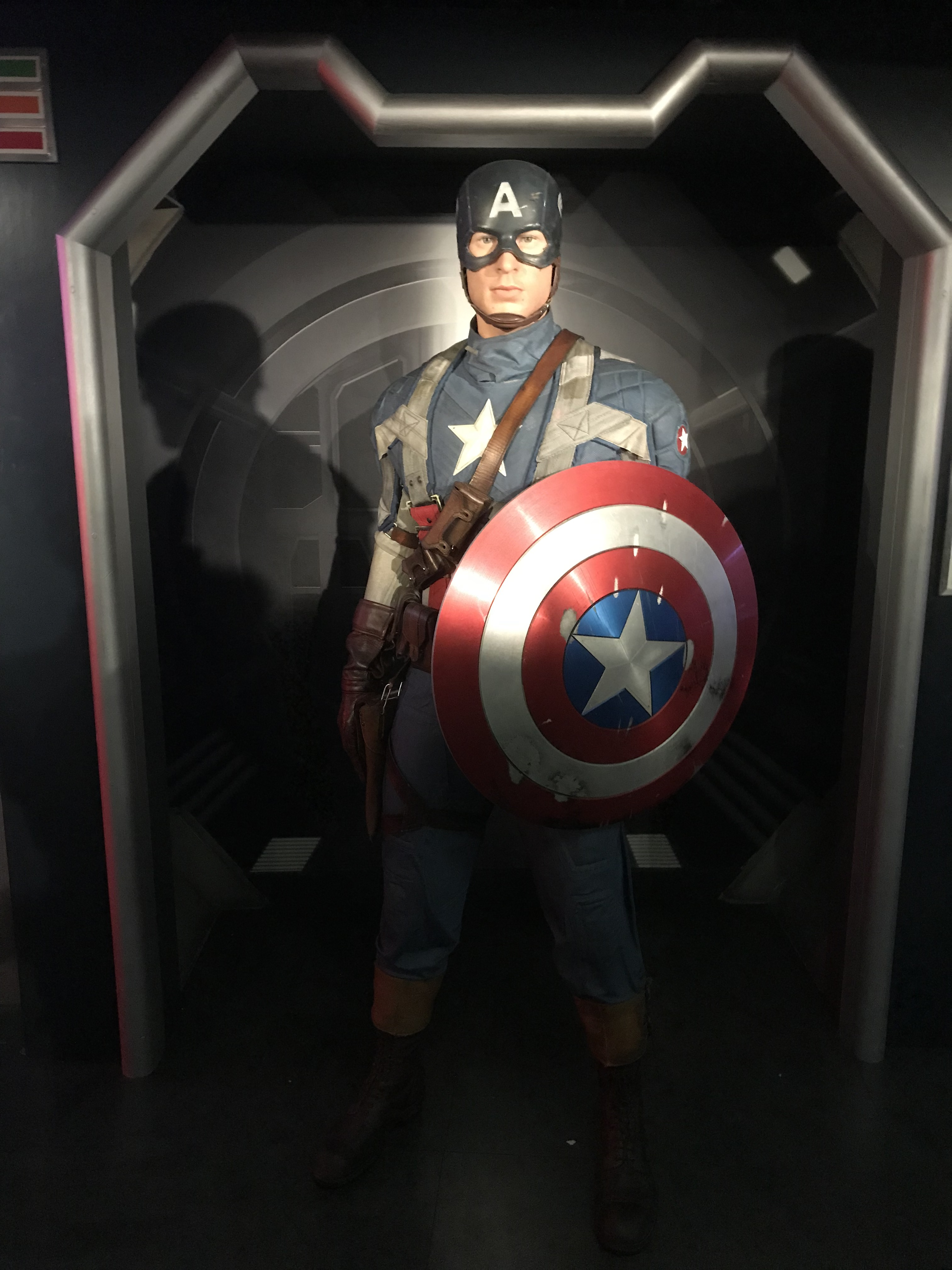 Captain America at Madame Tussauds London, July 17, 2019.